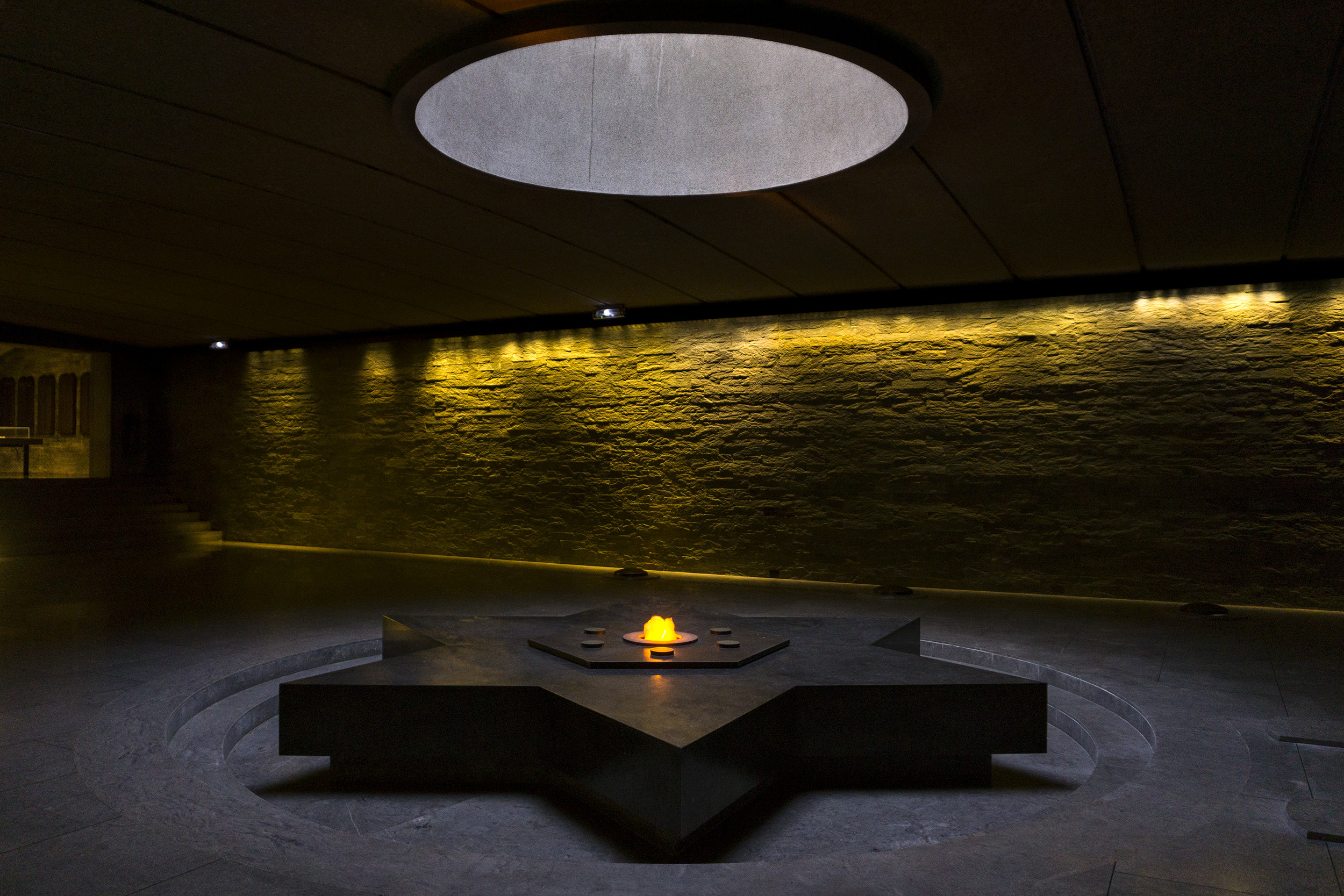 Crypte au mémorial de la Shoah à Paris